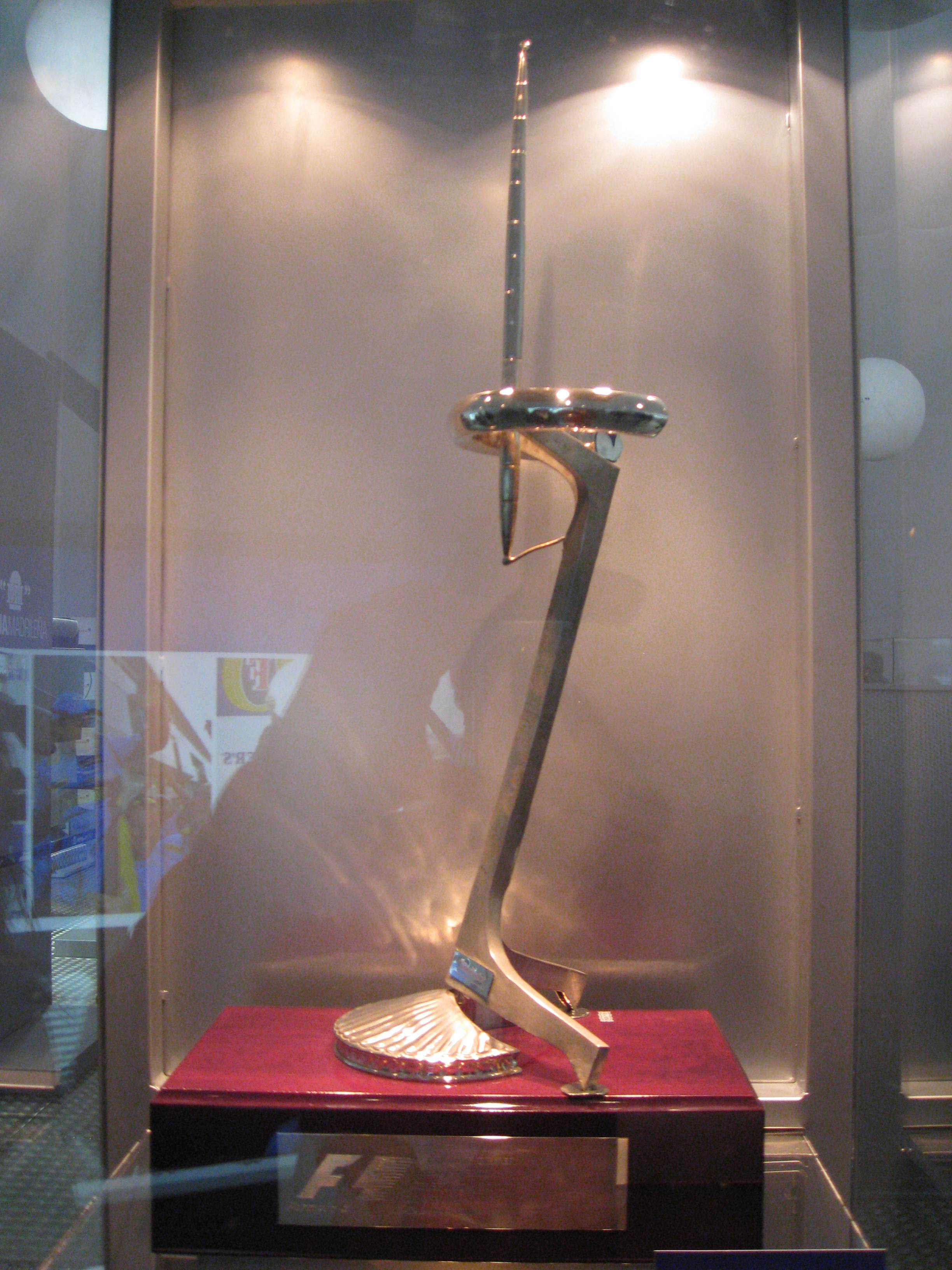 Trofeo gran premio de España de Telefónica, primer puesto de Fernando Alonso